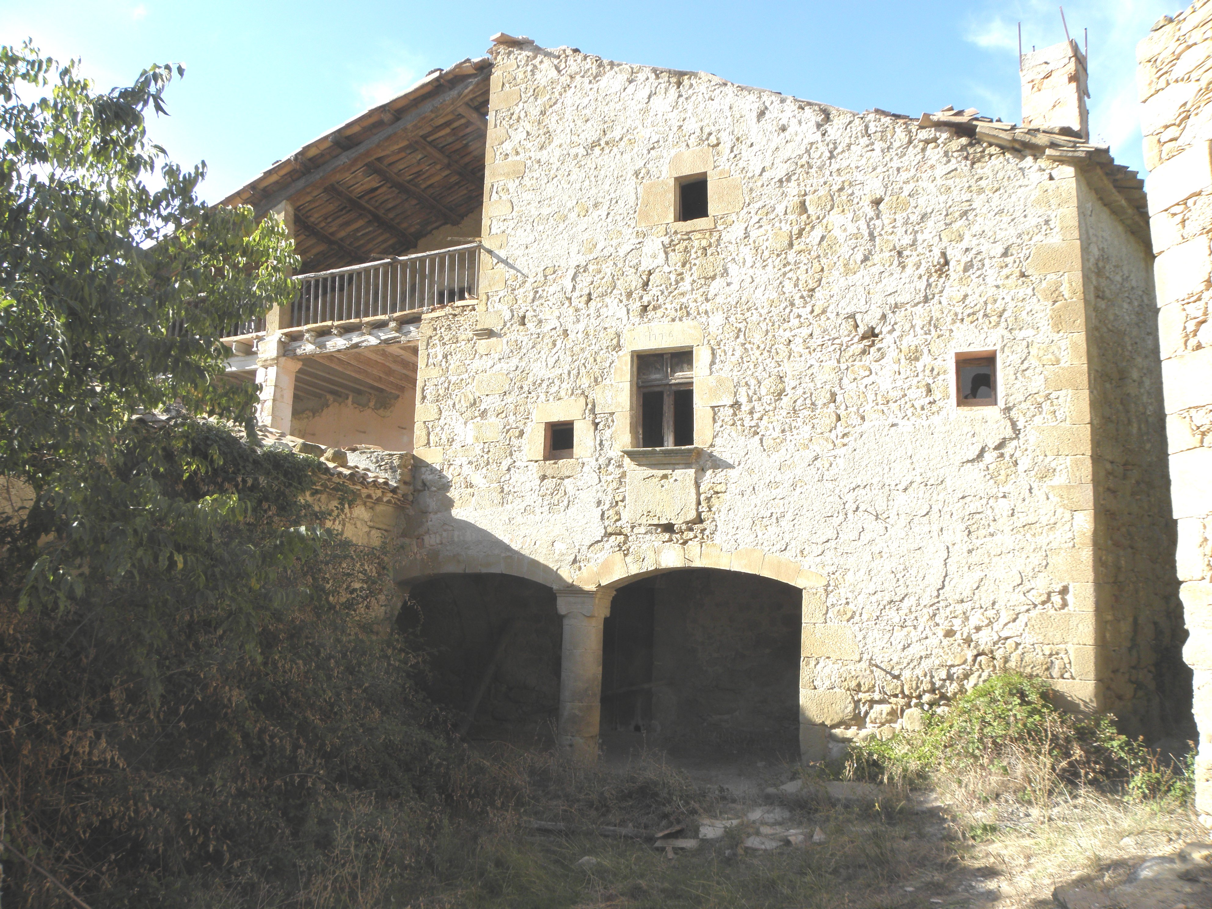 La façana principal (migjorn) de la masia de Comardons, municipi de Castellar de la Ribera (Solsonès)